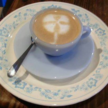 El arte latte realza la presentacion del cafe